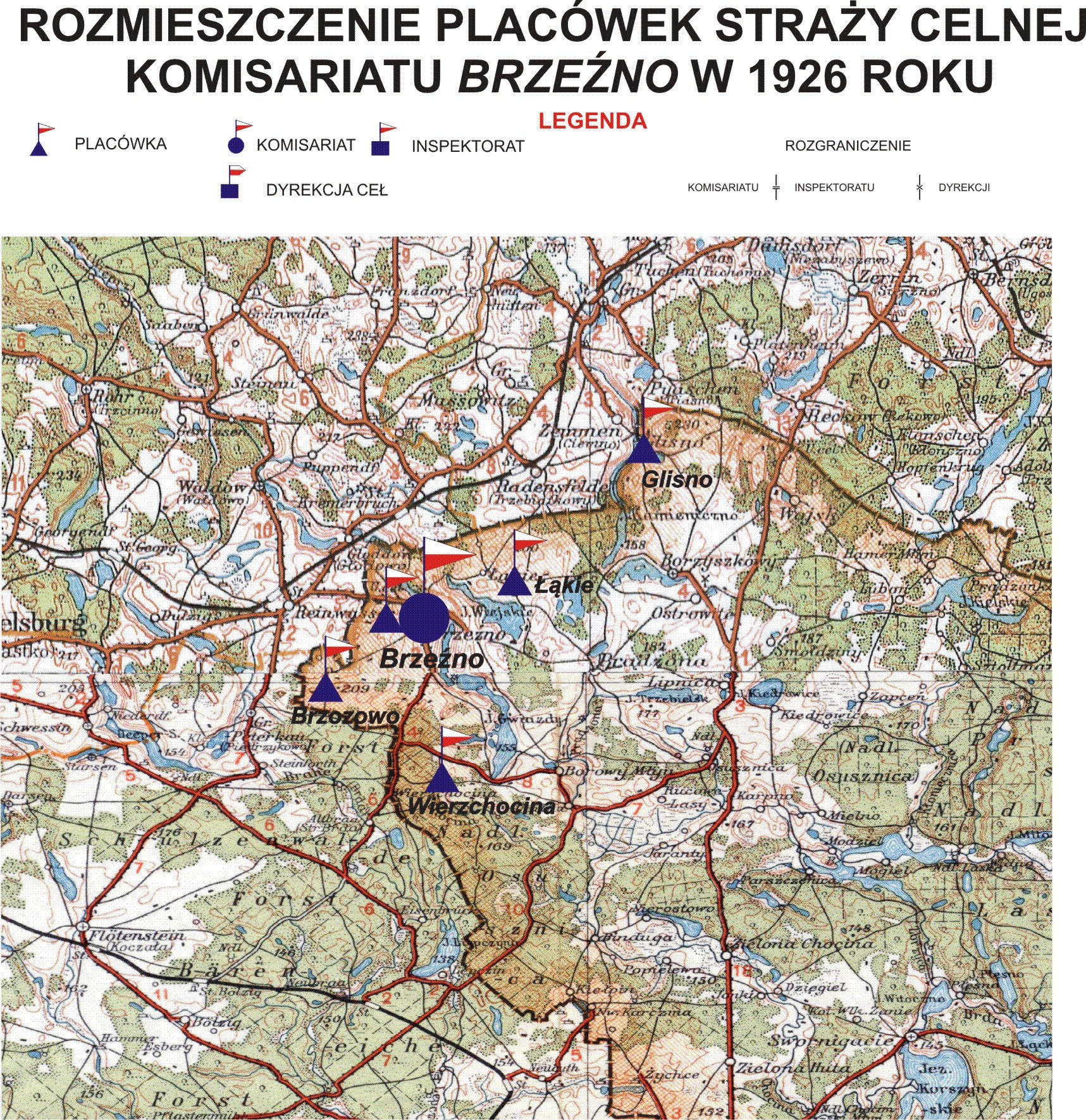 Rozmieszczenie placówek Straży Celnej Komisariatu Brzeźno